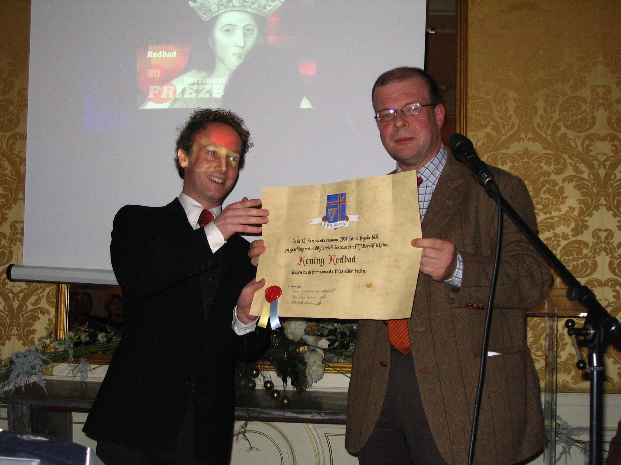 Uitreiking oorkonde na de verkiezing van Radboud tot Grootste Fries aan 'Redbadambassadeur'.Henk Wolf, rechts Tom van Mourik (december 2004)